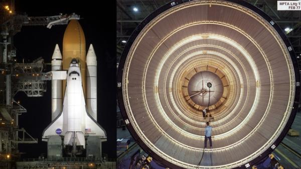 Imagem mostra o tanque de combustivel por dentro.